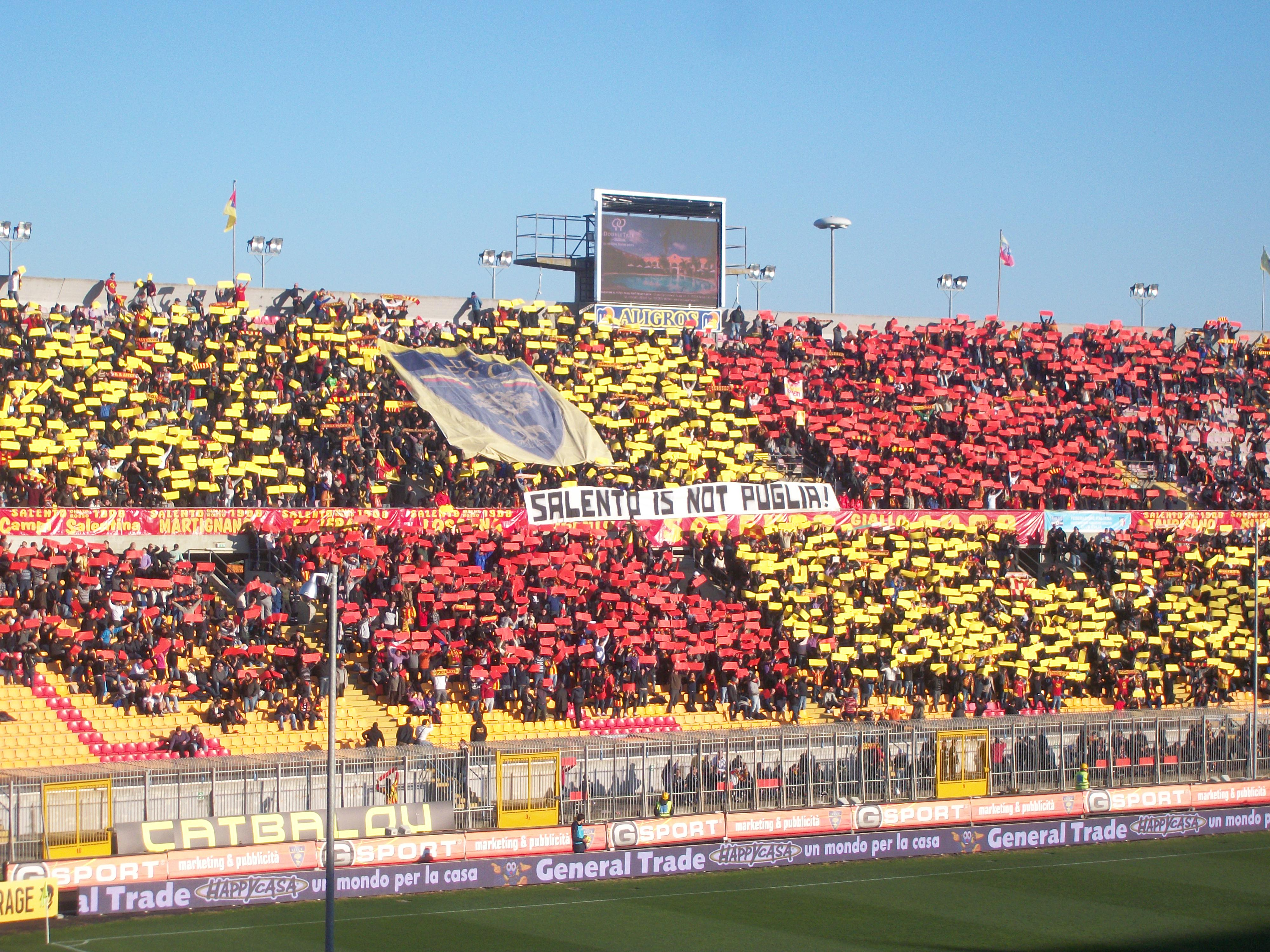 Coreografia tribuna est, derby Lecce-Bari del 06-01-2011